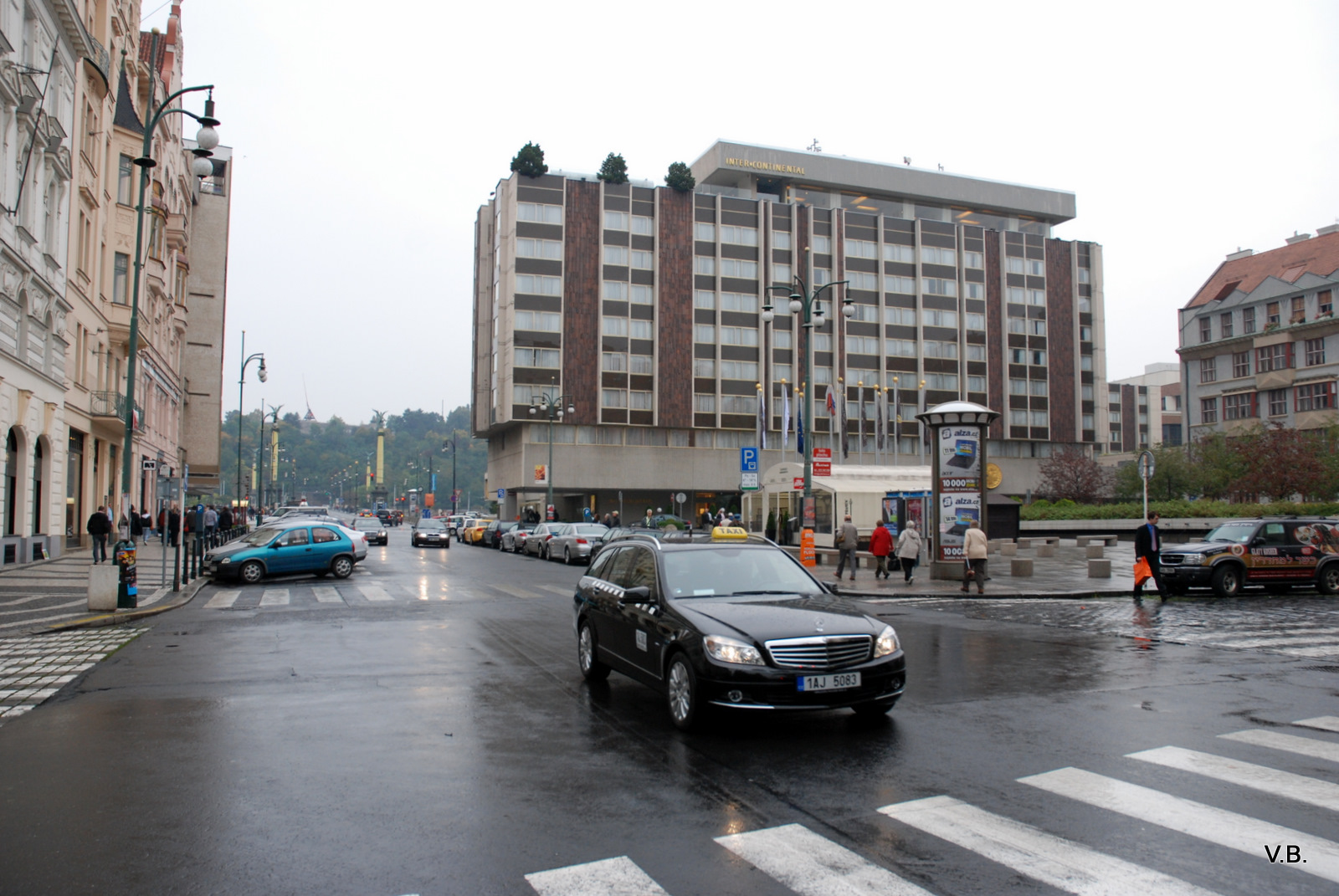 Площадь. Фото Виктора Белоусова.